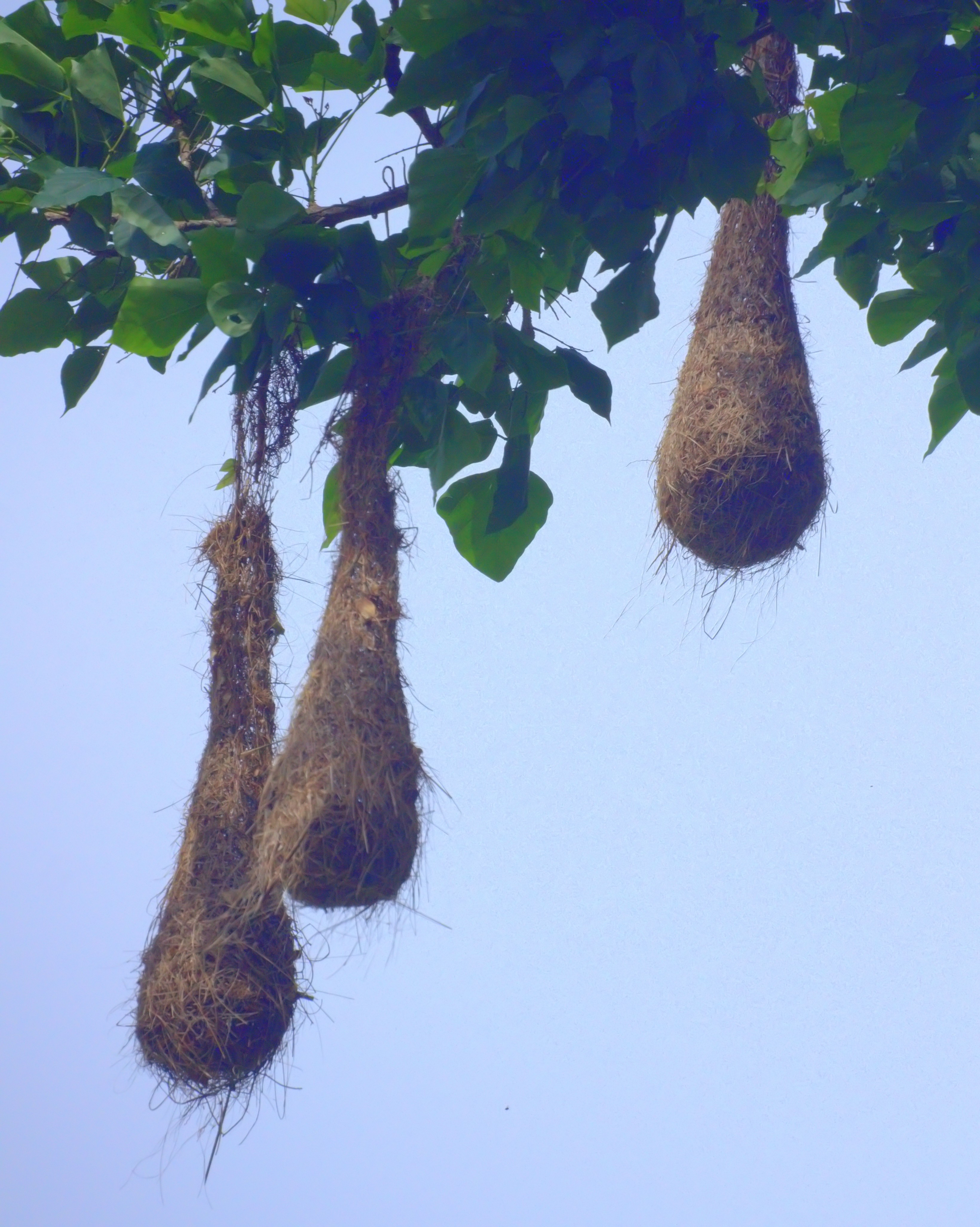 Oropendola Nest